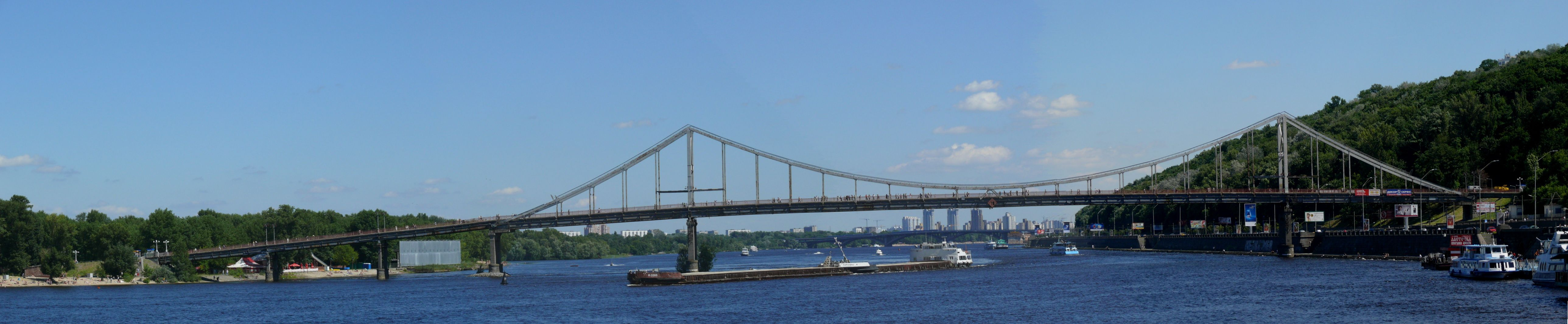 Парковый пешеходный мост через реку Днепр на Труханов остров в городе Киеве. Изображение сшито из четырех снимков. Фото сделано от речного вокзала. Расположение берегов соответствует направлению течения, слева - левый берег (Труханов остров, Днепровский парк), справа - правый берег Днепра (урочище Крещатый яр, Крещатый парк).